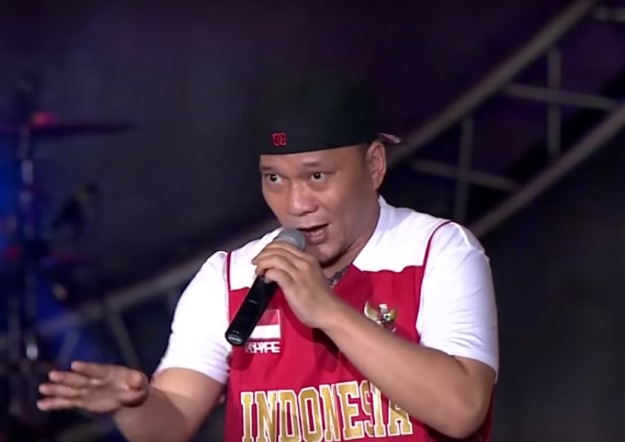 Gambar ditangkap dari video penampilan Iwa K bersama Denada di Konser Kemerdekaan yang diunggah oleh Netmediatama di kanal youtubenya dengan lisensi CC BY.